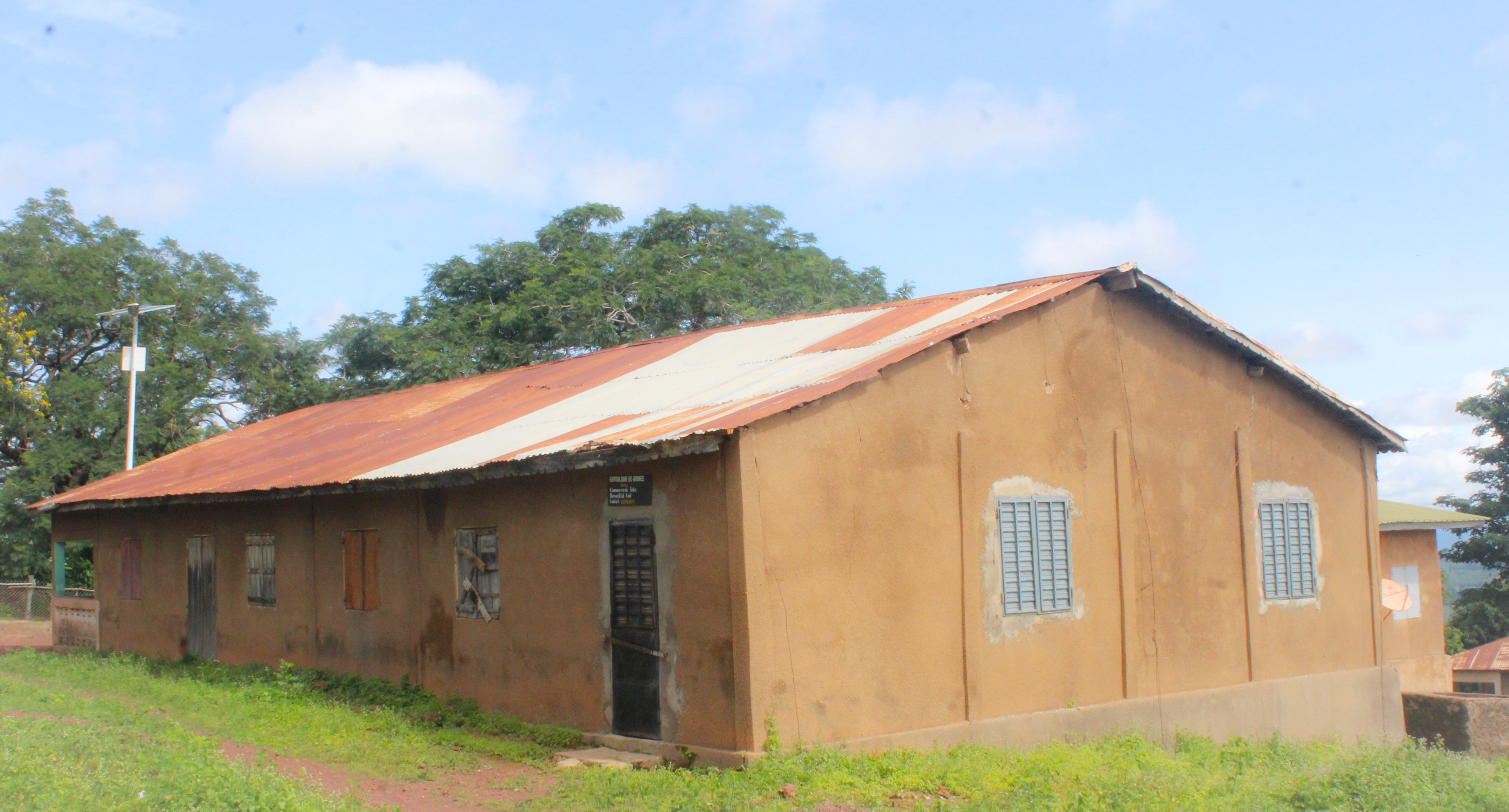 Bâtiment administrative de Téliré centre